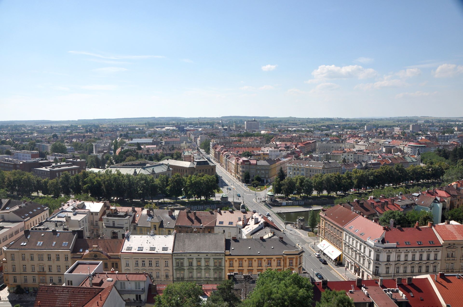 Hradec Králové (Königgrätz), Weißer Turm